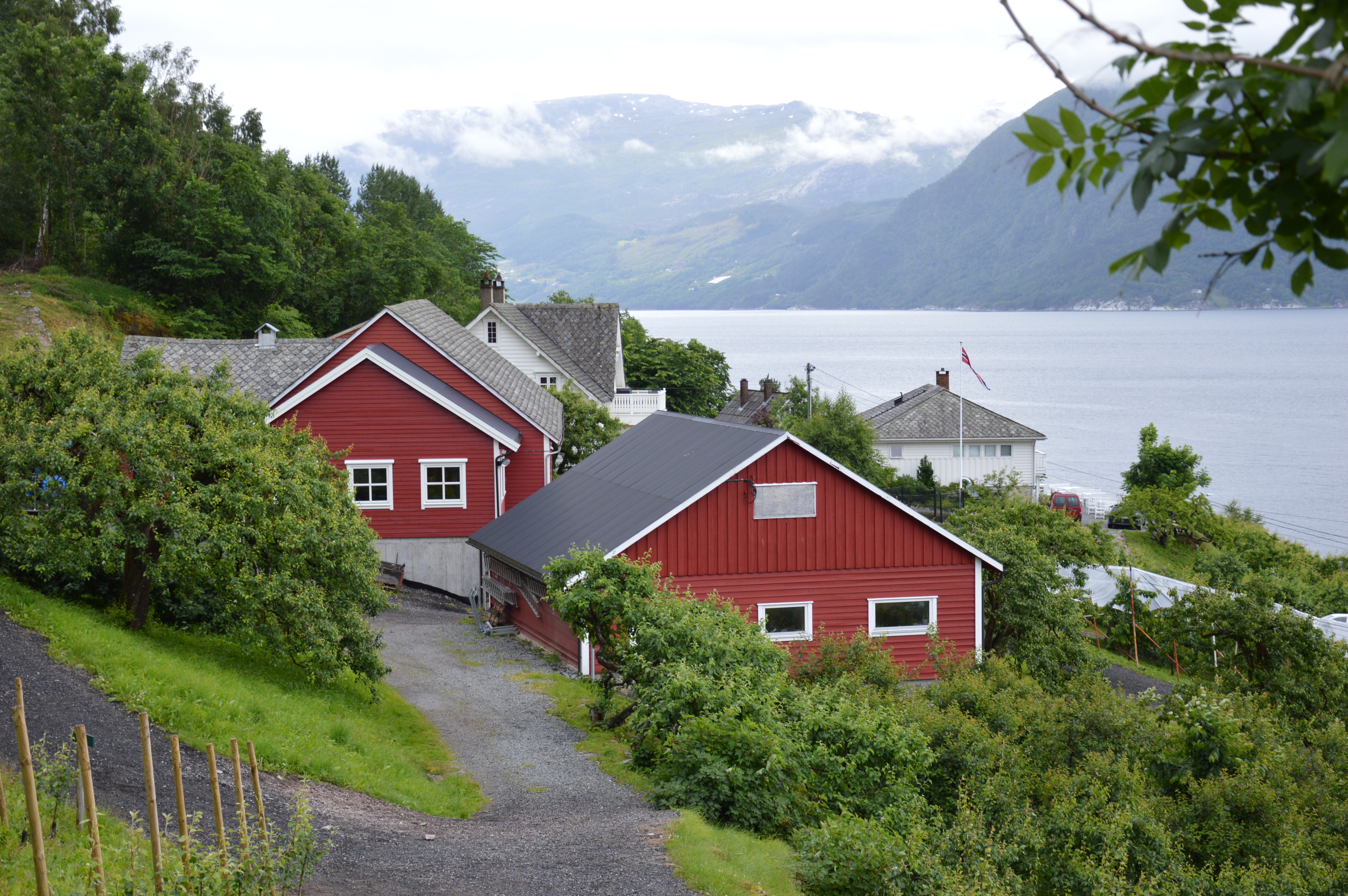 Steinsto Obsthof